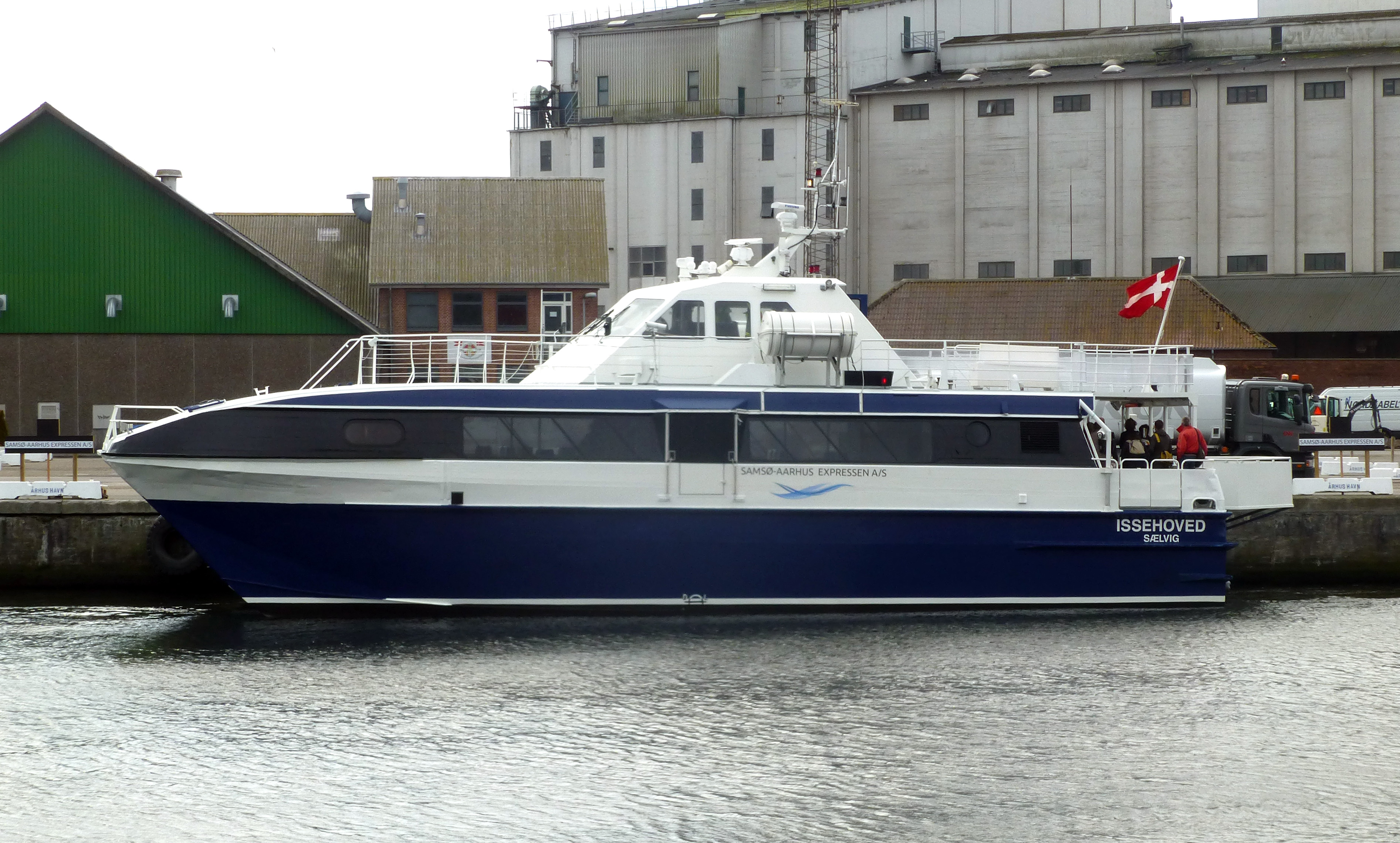 Hurtigfærgen Issehoved i aarhus Havn